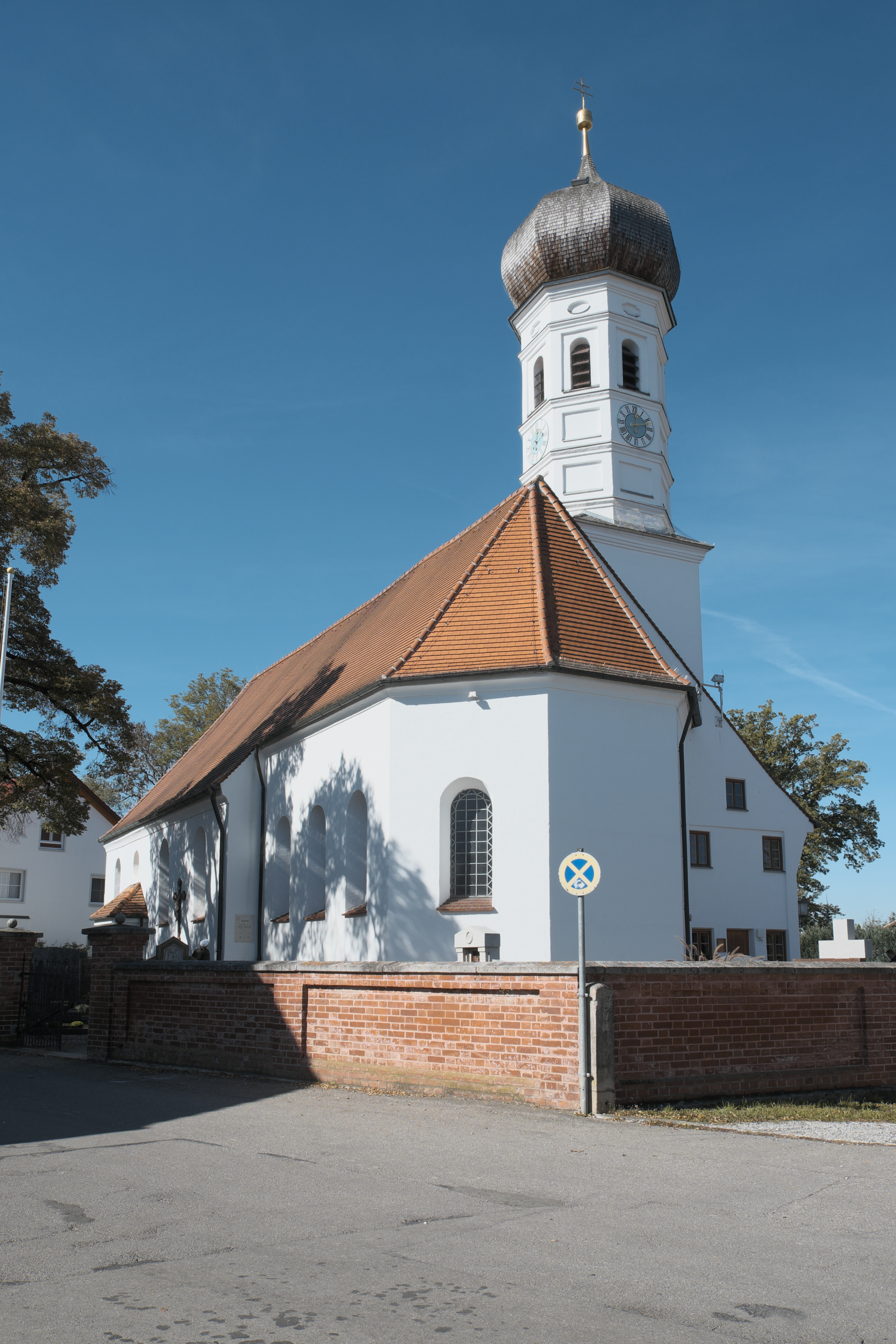 Katholische Pfarrkirche St. Michael in Jesenwang im Landkreis Fürstenfeldbruck (Bayern/Deutschland)